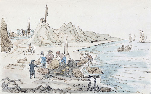 Antycke steenen en penningen, gevonden op de zeestrandt bij Domburgh in January 1647discovery of a Nehalennia-temple in Domburg, Netherlands